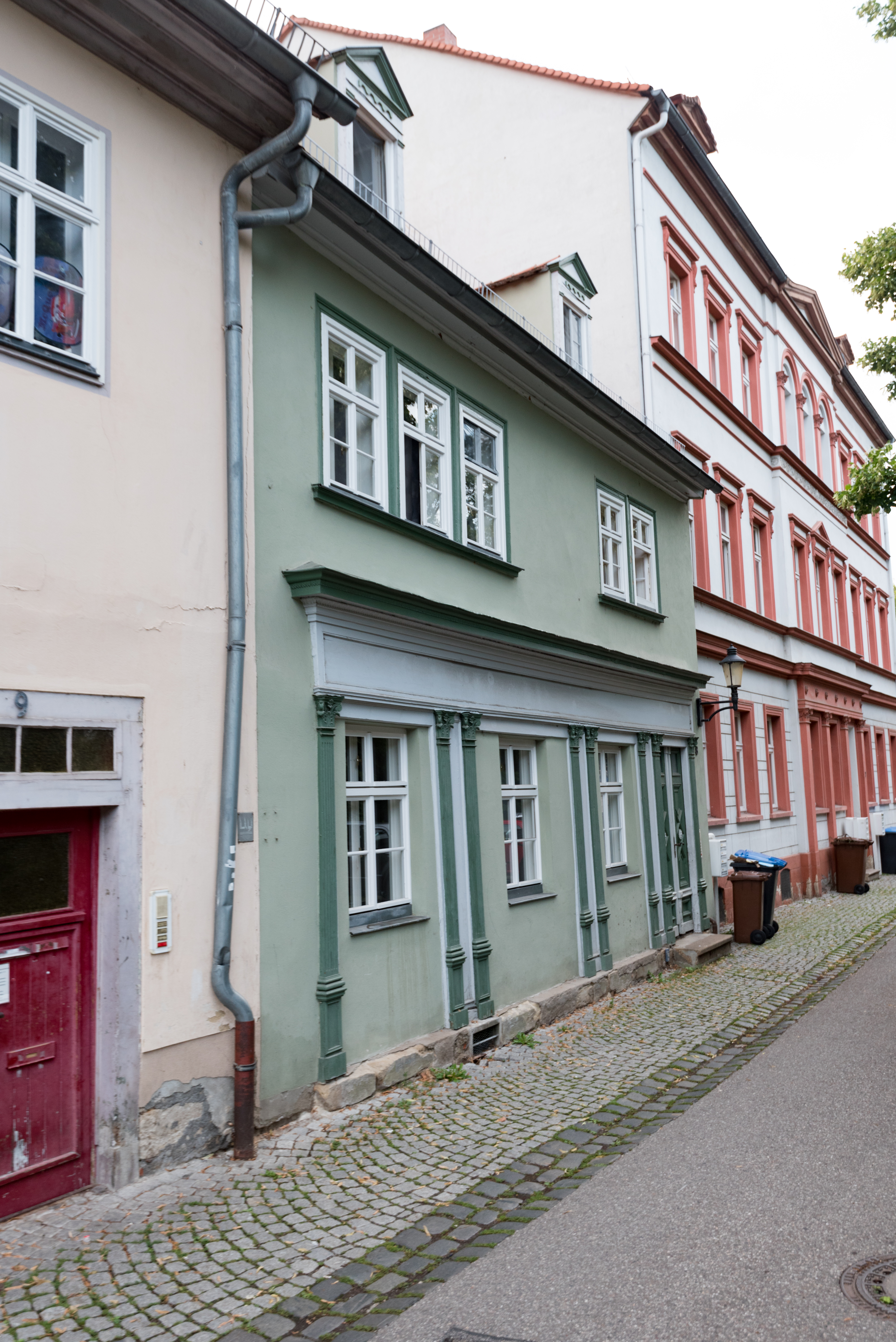 Naumburg (Saale), Kramerplatz 8